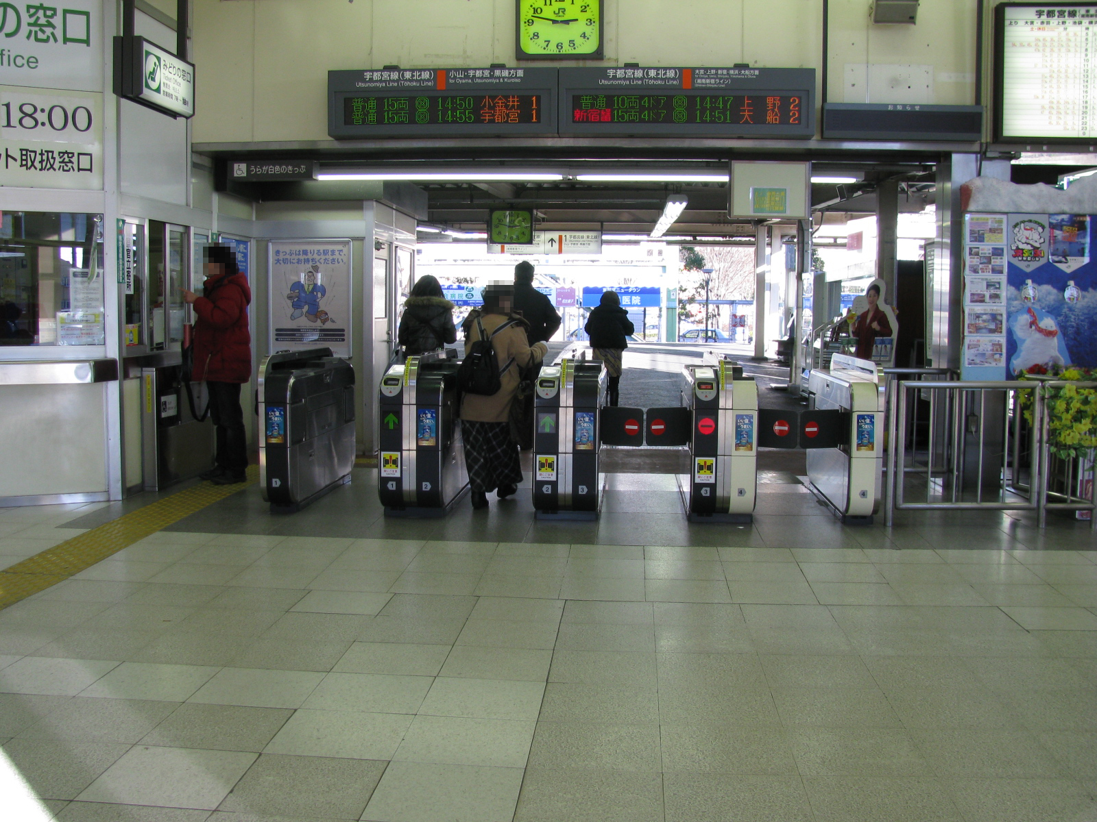 JR東鷲宮駅